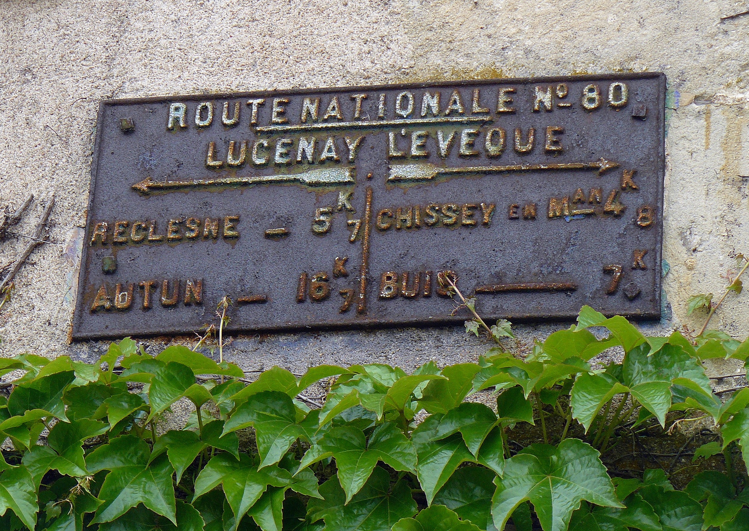 Ancienne signalisation routière à Lucenay-l'Evêque (Saône-et-Loire, France)